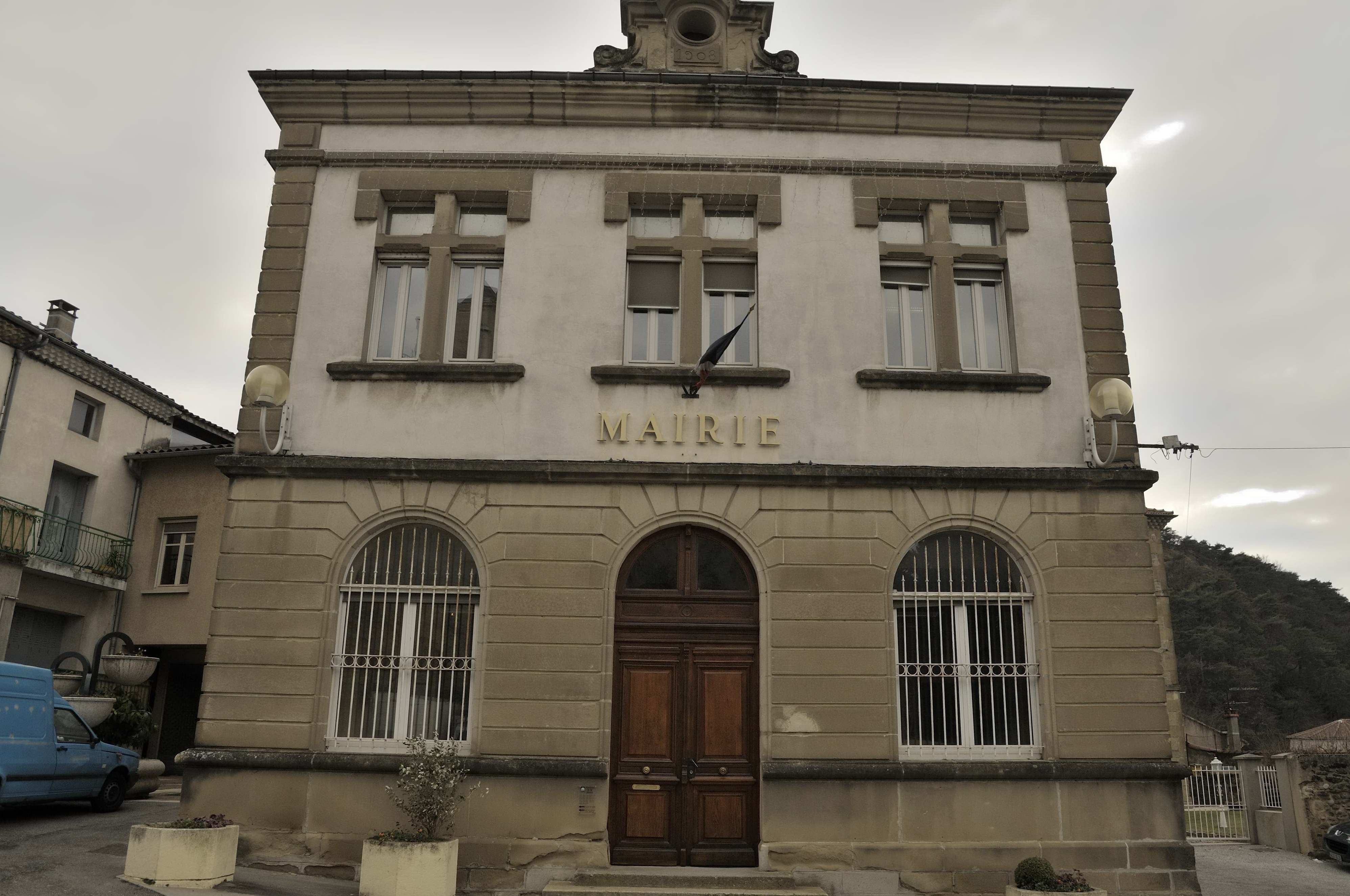 mairie de Châteauneuf sur Isère